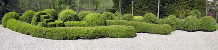 jardin